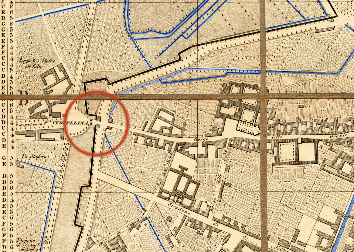 L'area di Porta Vercellina in una carta topografica di Milano dell'anno 1860, autore ing. Giovanni Brenna, editore Antonio Vallardi, Milano 1860. Si noti la denominazione Porta Vercellina e la presenza dei due caselli daziari. L'attuale corso Magenta conserva ancora la vecchia dicitura "Borgo delle Grazie".